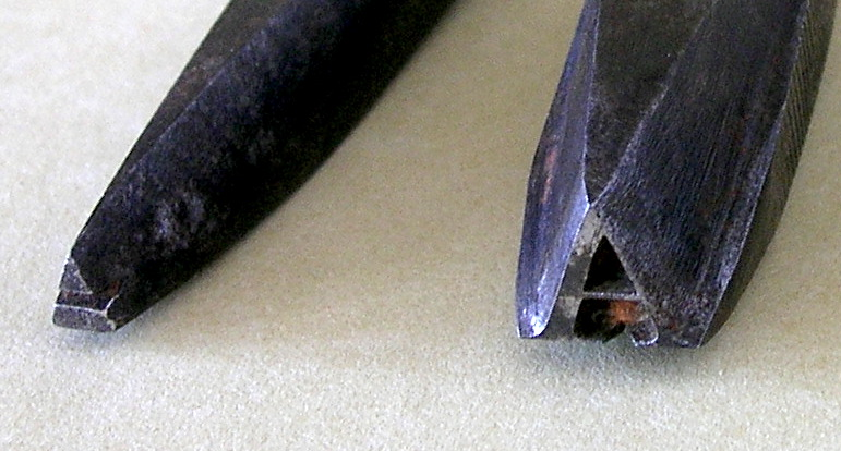 Punzón, contrapunzón y matriz perteneciente a una antigua póliza de Bodoni, gentileza de la Universidad de Barcelona